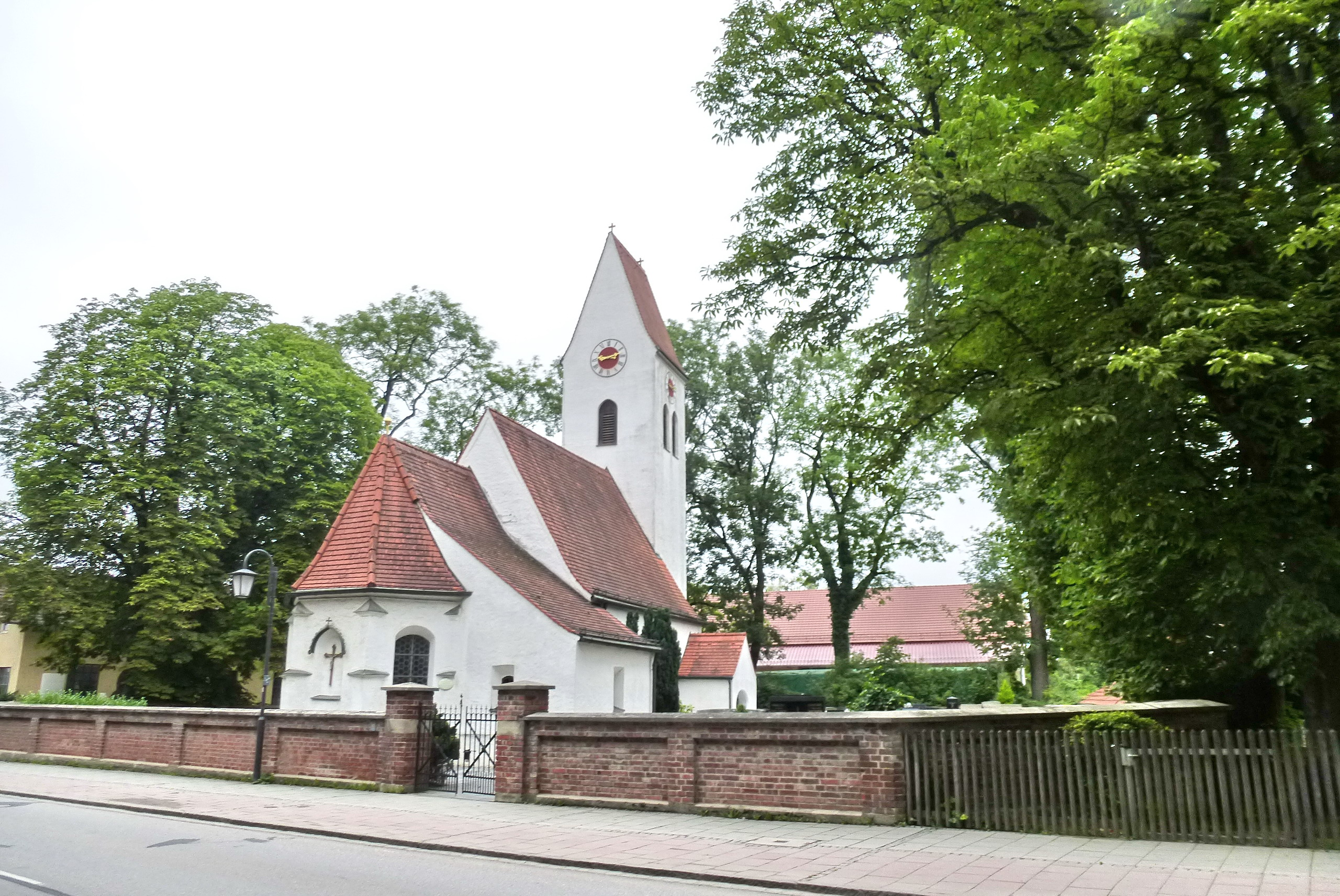 Dornach bei München, katholische Kirche St.Margareta